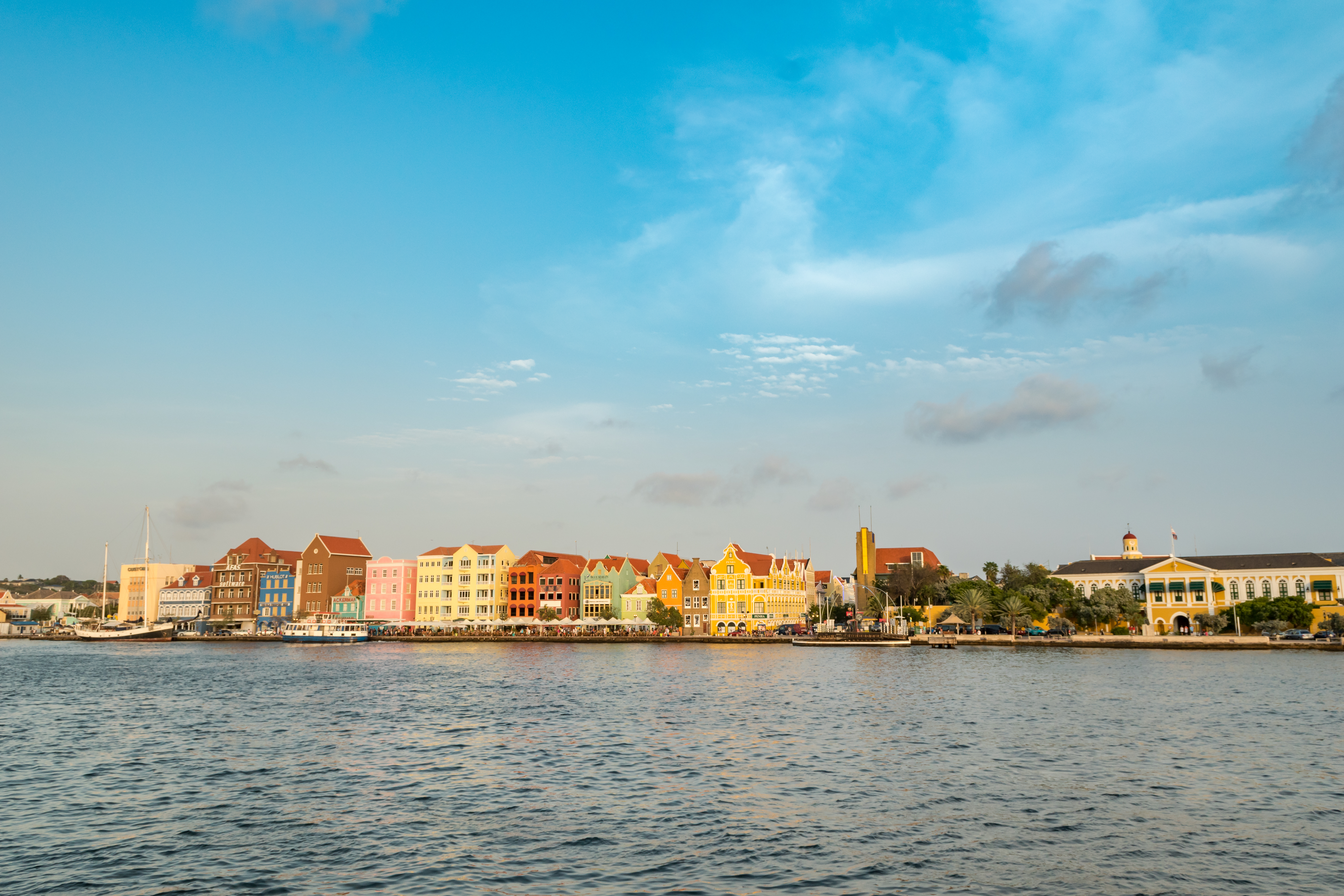 Curacao Willemstad Curacao